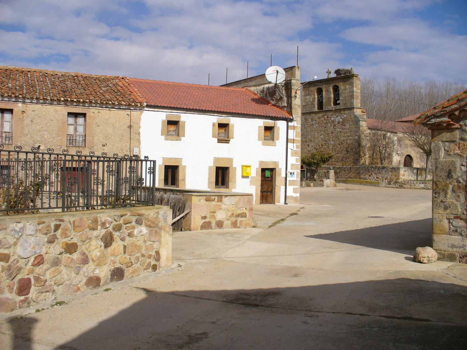 Vista de la plaza de Tardesillas con el Telecentro a la izquierda y a la derecha detalle del posible edificio que ocupaba la "casa de las monjas" (ubicación más plausible)